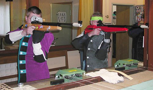 Wettkampf im Luftgewehrschießen Bild: Wilfried Wittkowsky, Schützenbund Wesermarsch